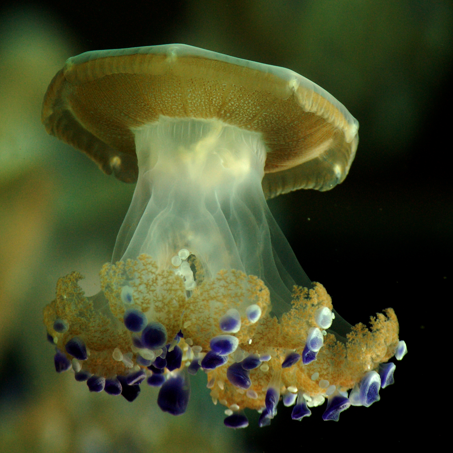 jellyfish